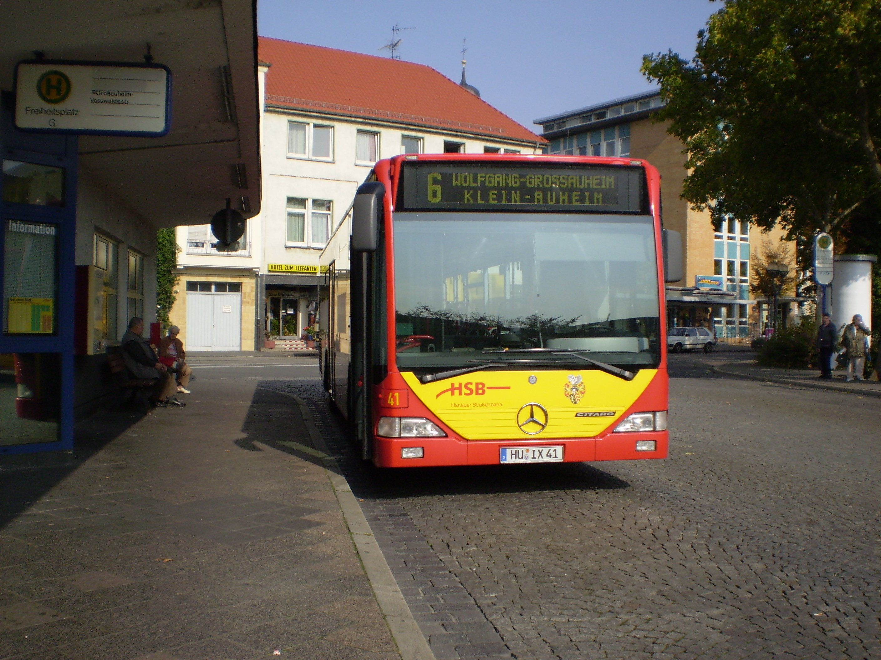 Citaro, neuere Baureihe der HSB, hier am Freiheitsplatz.